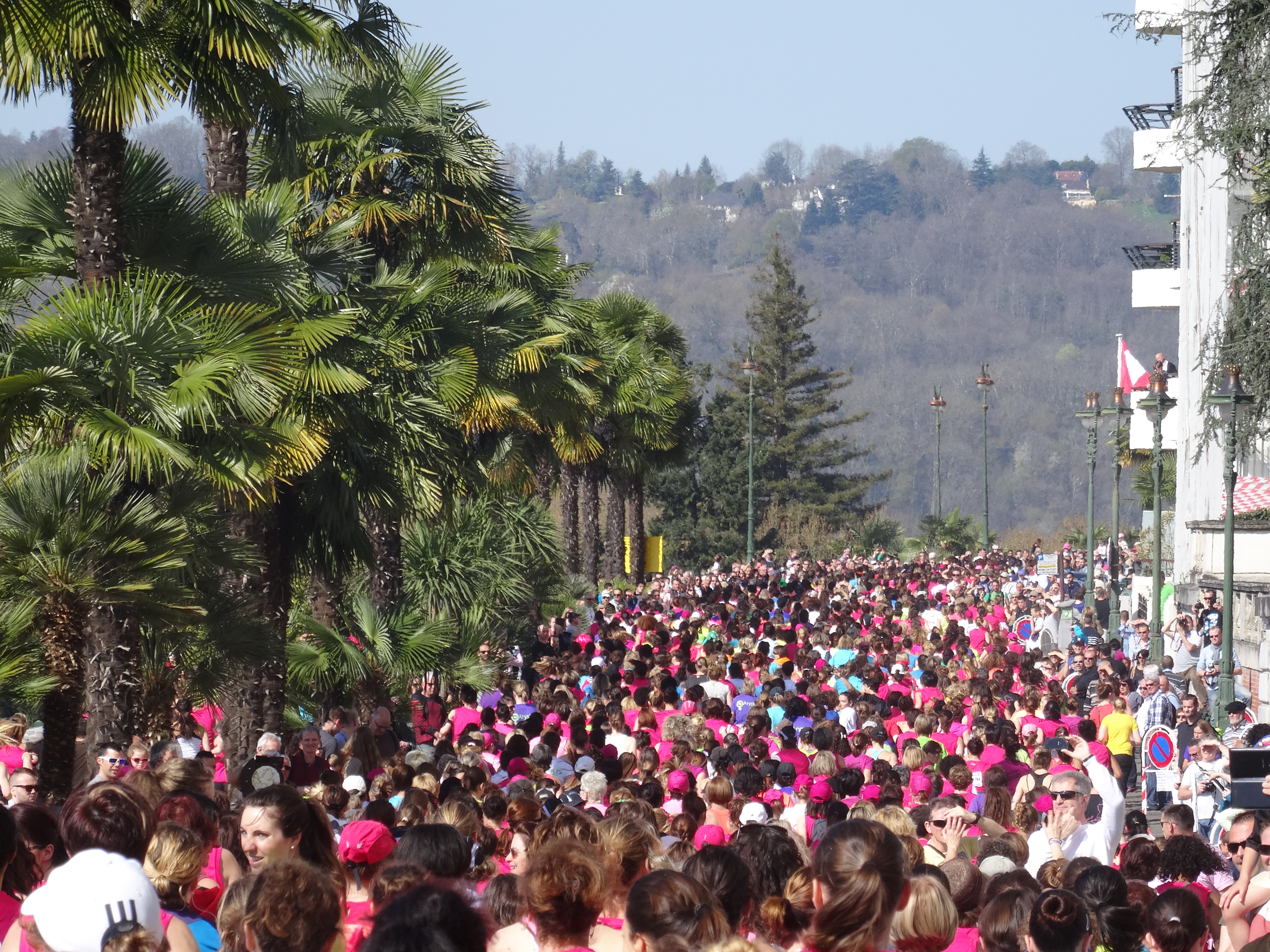 Le boulevard des Pyrénées de Pau pendant la Féminine